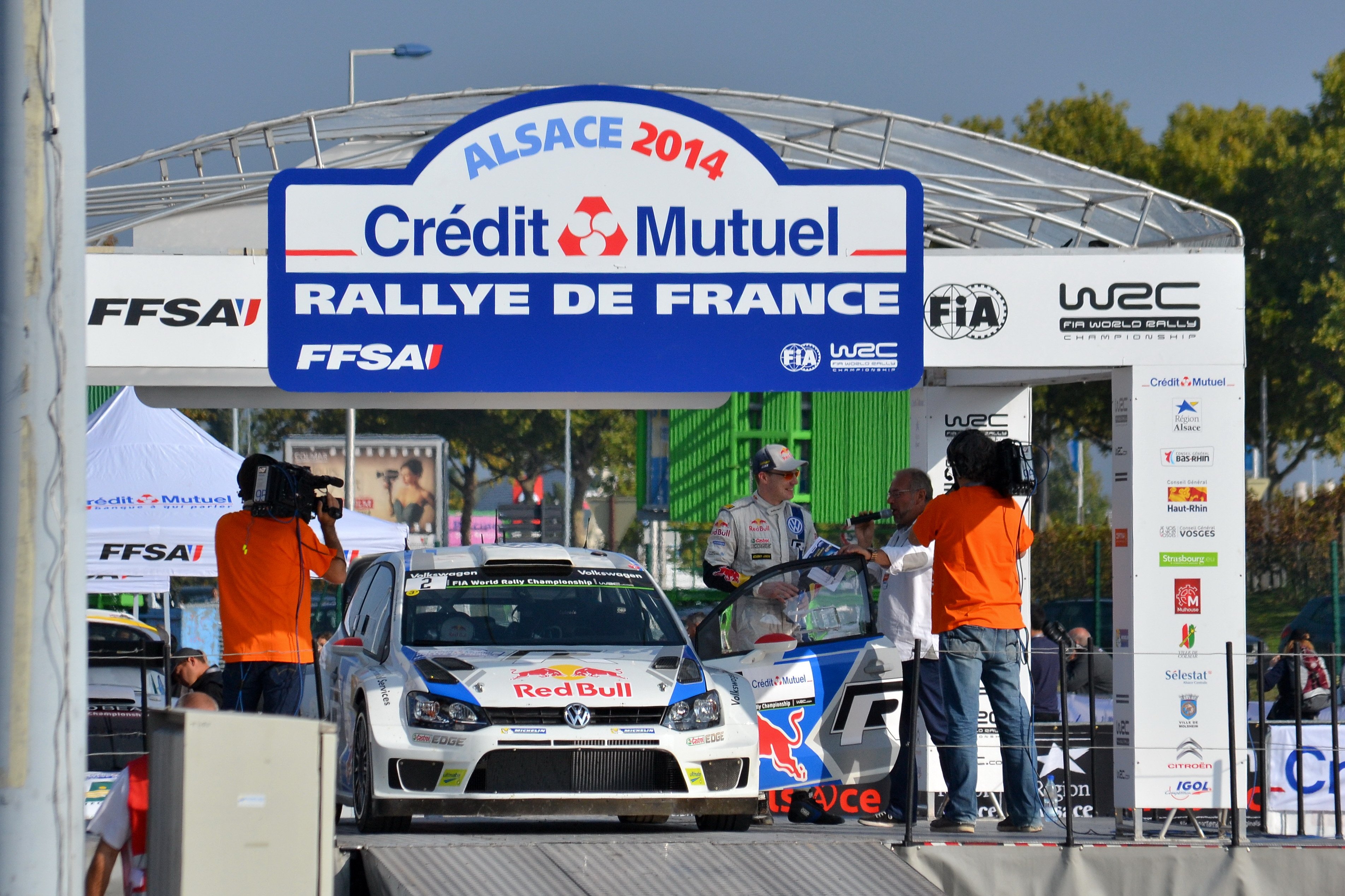 Jari-Matti Latvala sur le podium du parc d'assistance de Colmar durant le Rallye de France-Alsace 2014.